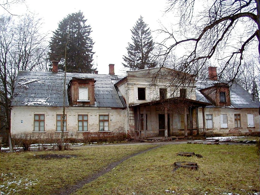 Raudas muiža 2001-04-21